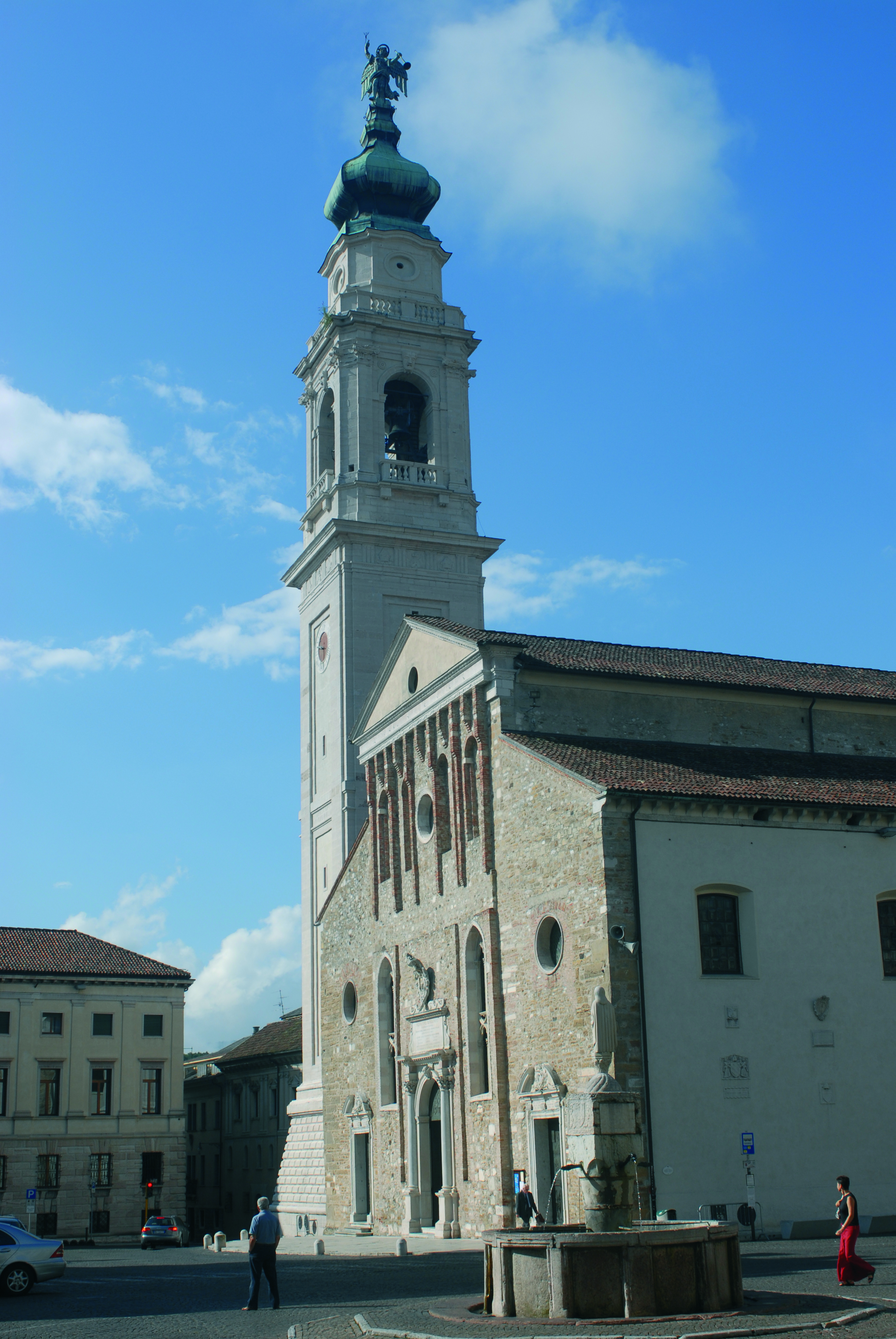 Belluno, la Basilica cattedrale di San Martino (Duomo di Belluno)